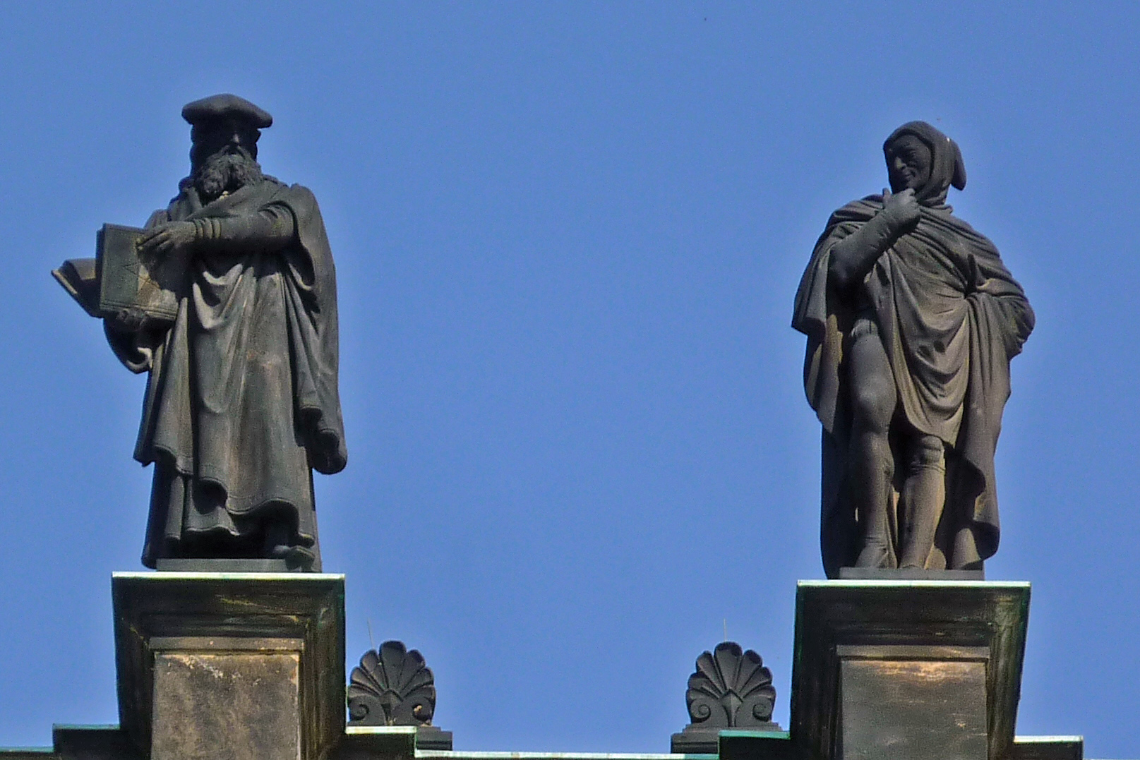 Skulpturen Faust und Mephisto an der Semperoper in Dresden